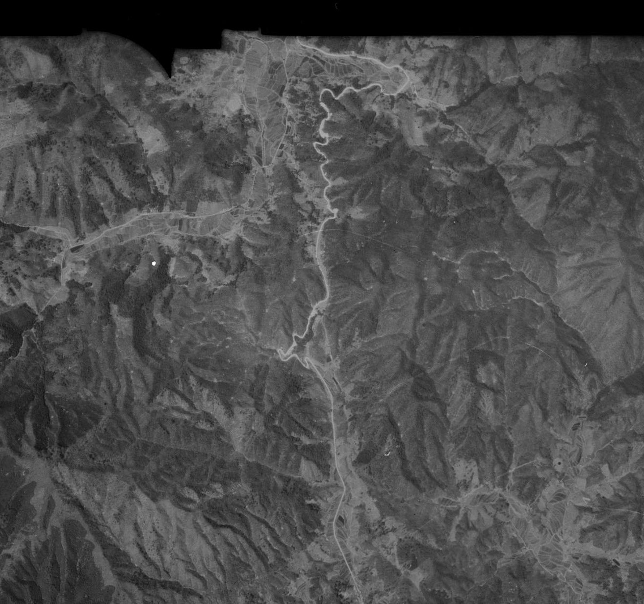 1948年の島根県と広島県の県境である赤名峠